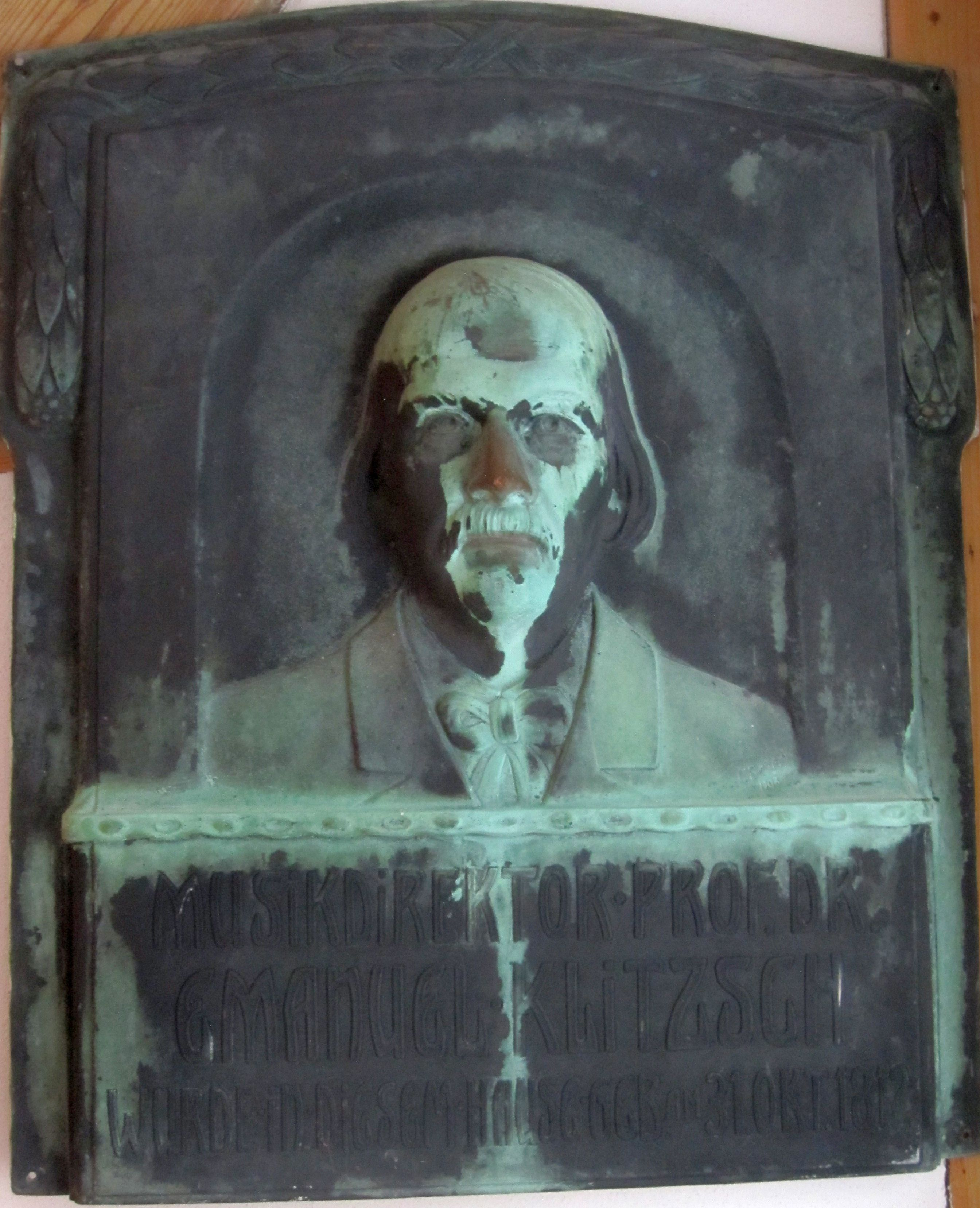 Kupferne Gedenktafel für den Komponisten Karl Emanuel Klitzsch mit seinem Portrait als Halbrelief. Text auf der Tafel in Jugendstilschrift: "Musikdirektor Prof. Dr. Emanuel Klitzsch wurde in diesem Hause geb. am 31. Okt. 1812" Im Jahr 1908 wurde während einer Ehrenfeier für Klitzsch die Gedenktafel in Schönheide über der Eingangstür der früheren Mittleren Schule, Hauptstraße 51, angebracht, wo er als Sohn des Lehrers Johann Christian Klitzsch geboren wurde. Klitzsch starb am 5. März 1889 in Zwickau. In den 2000er Jahren bei einer Gebäuderenovierung entfernt, hängt die Gedenktafel heute im Schönheider Bürsten- und Heimatmuseum.